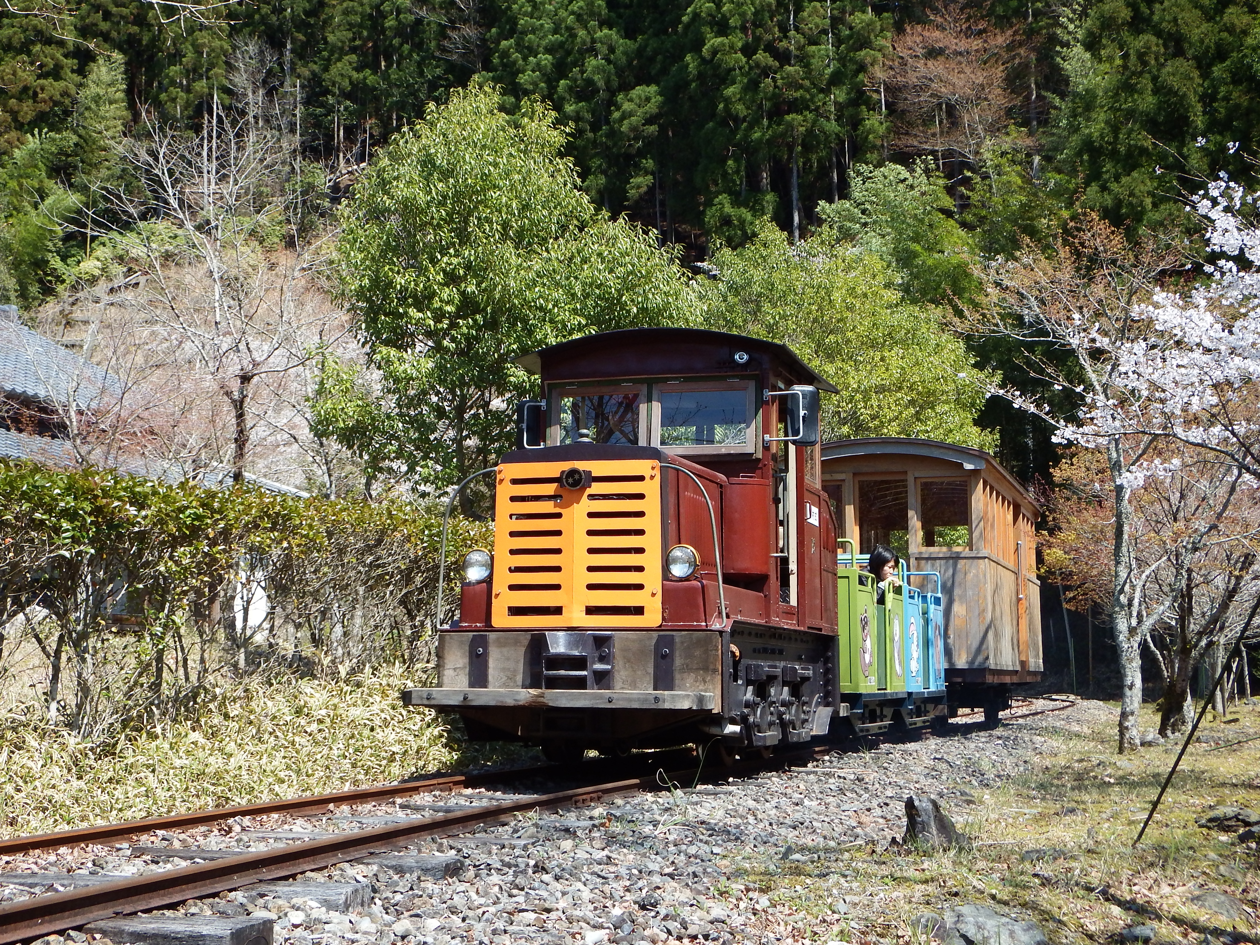 魚梁瀬地区丸山公園で保存運転中の野村式機関車